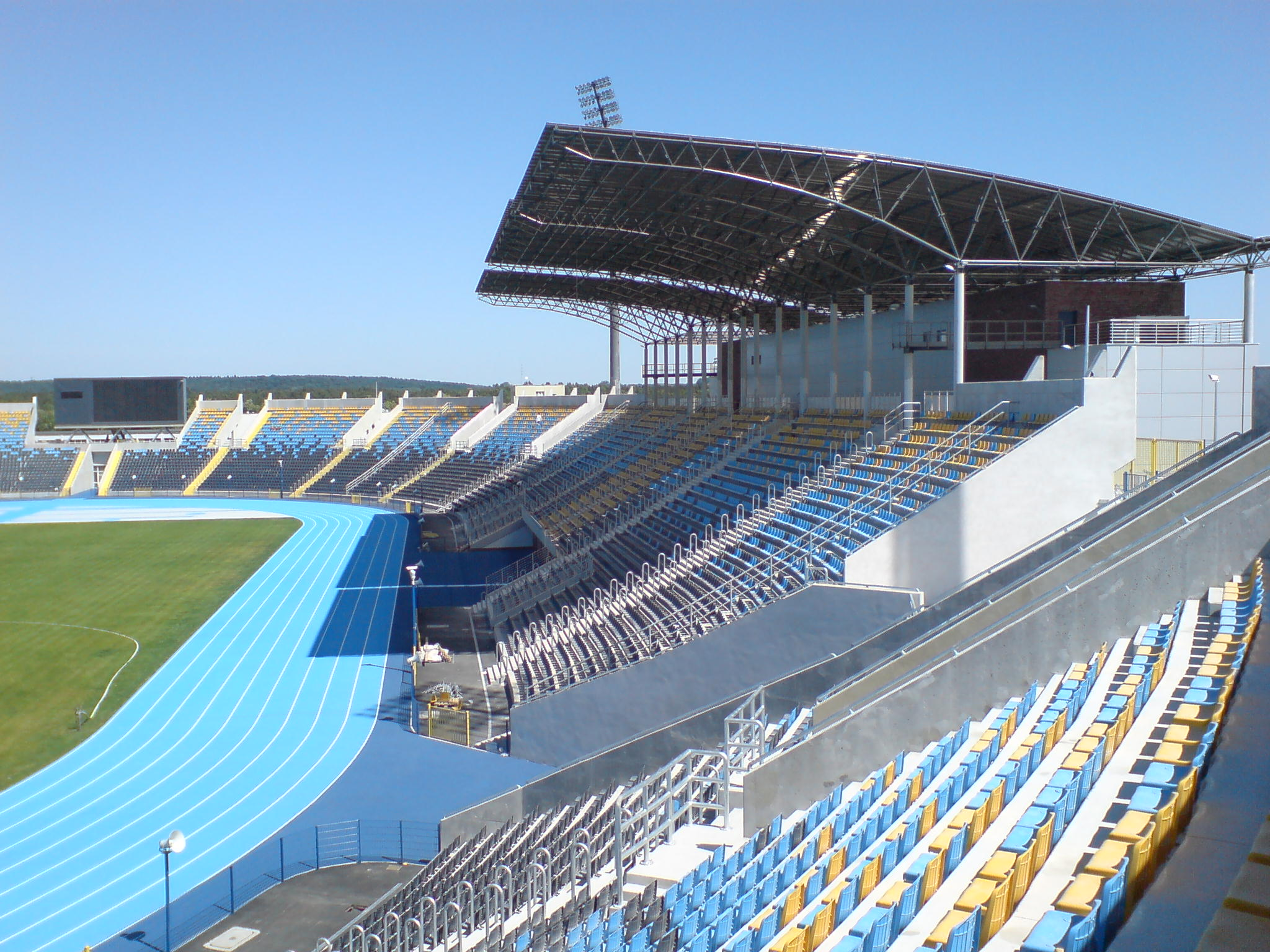 Stadion im. Zdzisława Krzyszkowiaka w Bydgoszczy - widok na trybunę B.